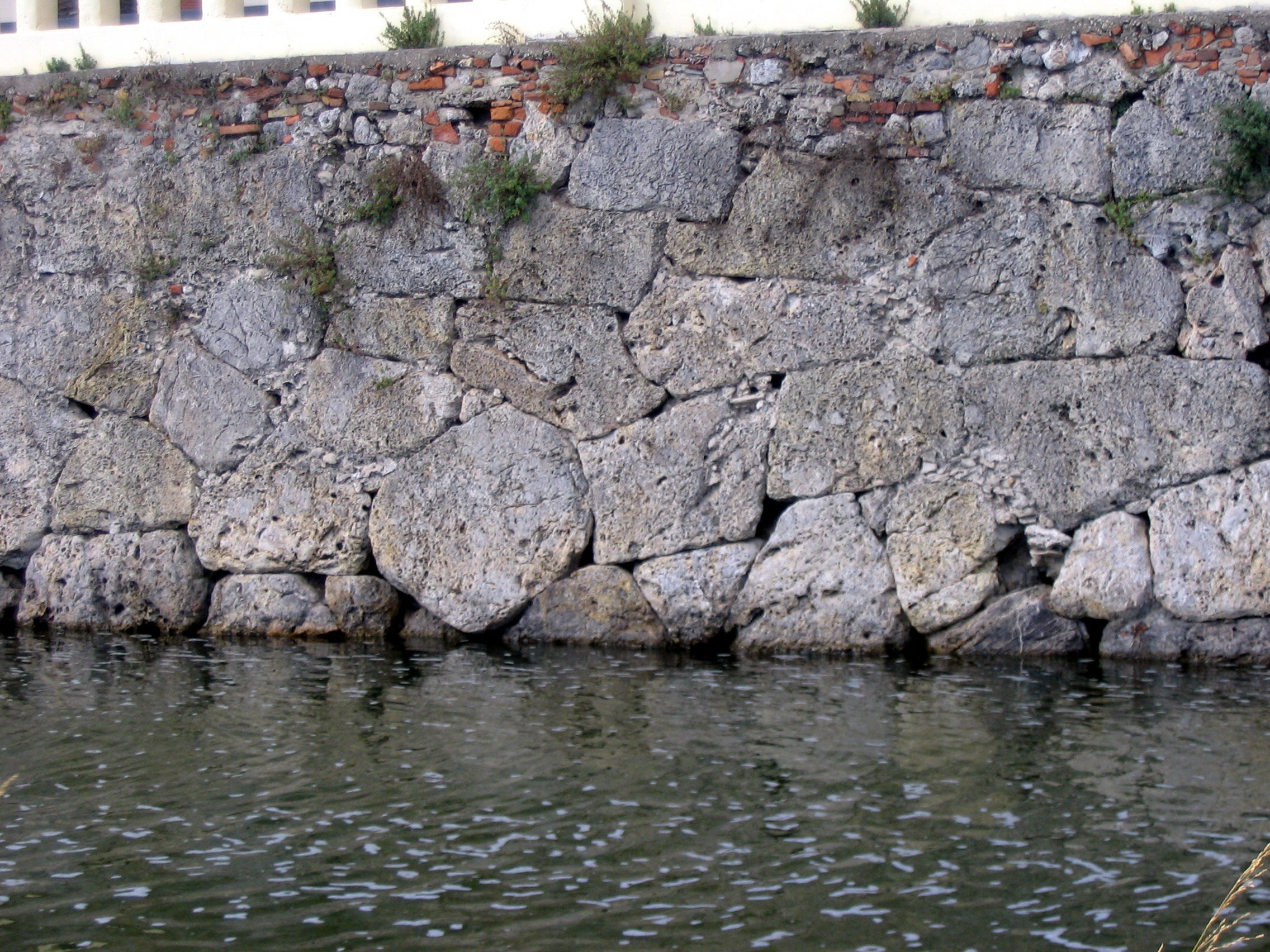 Orbetello, Toscana, Italia: Etruscan wall